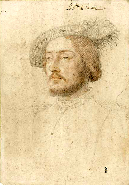 Portrait of Charles de Cossé, comte de Brissac, vers 1537